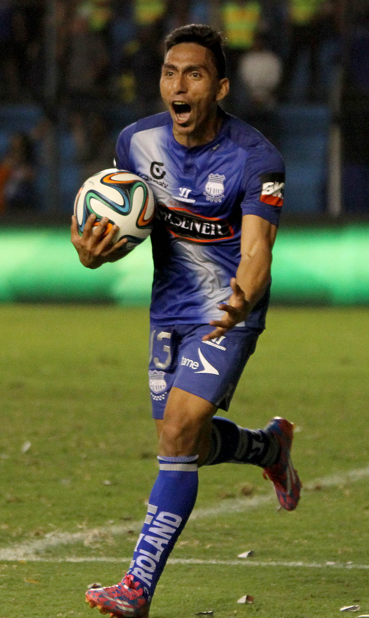 Guayaquil, Ecuador, 23 de noviembre2014 (Andes).- Emelec se impusó 1x0 a Independiente del Valle, en el partido jugado por la décima octava fecha del campeonato nacional de futbol, en la gráfica Angel Mena celebra el gol "eléctrico"